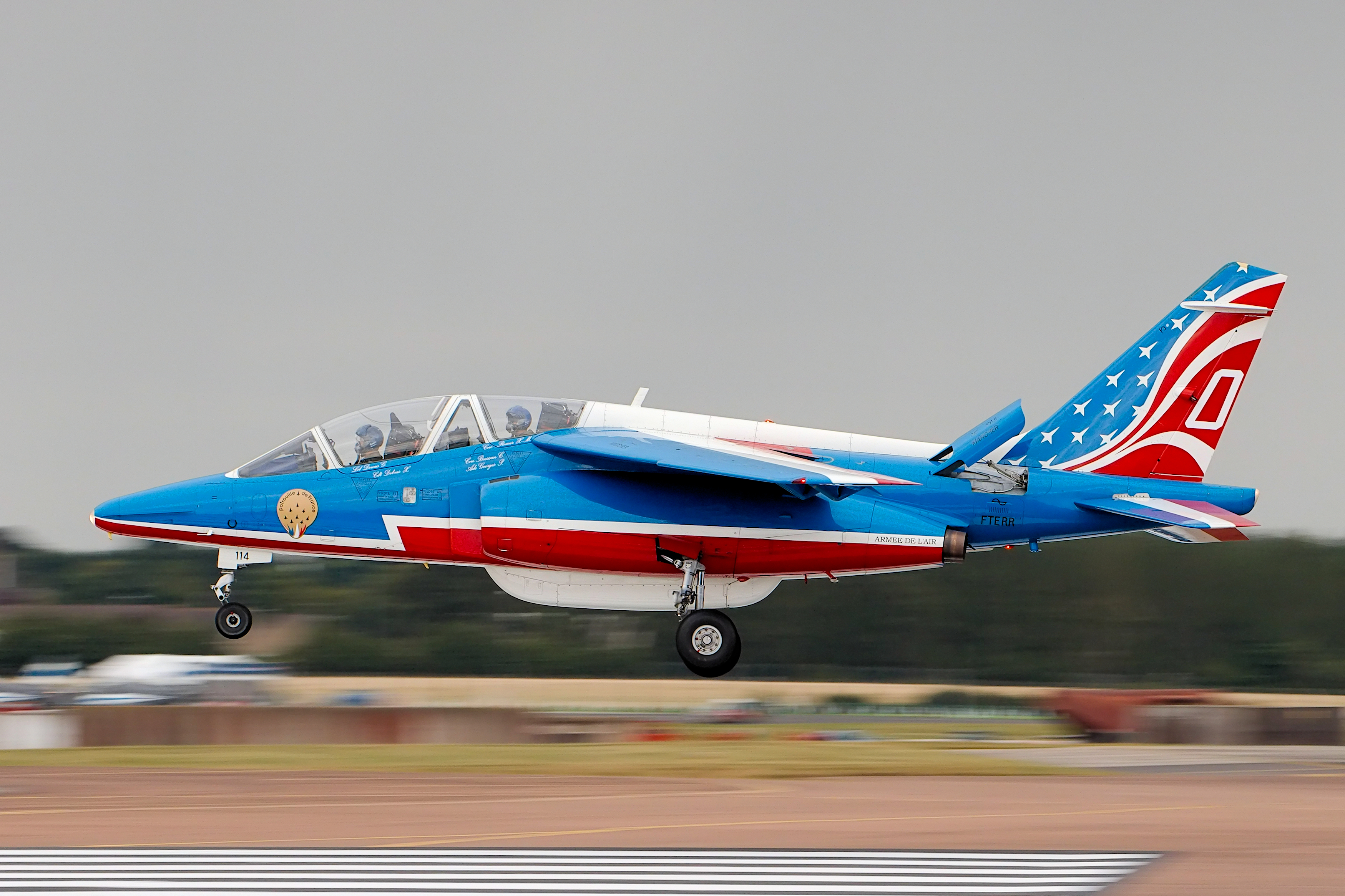 Alpha Jet - RIAT 2017